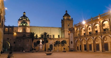 Piazza della Repubblica - Mazara dl Vallo